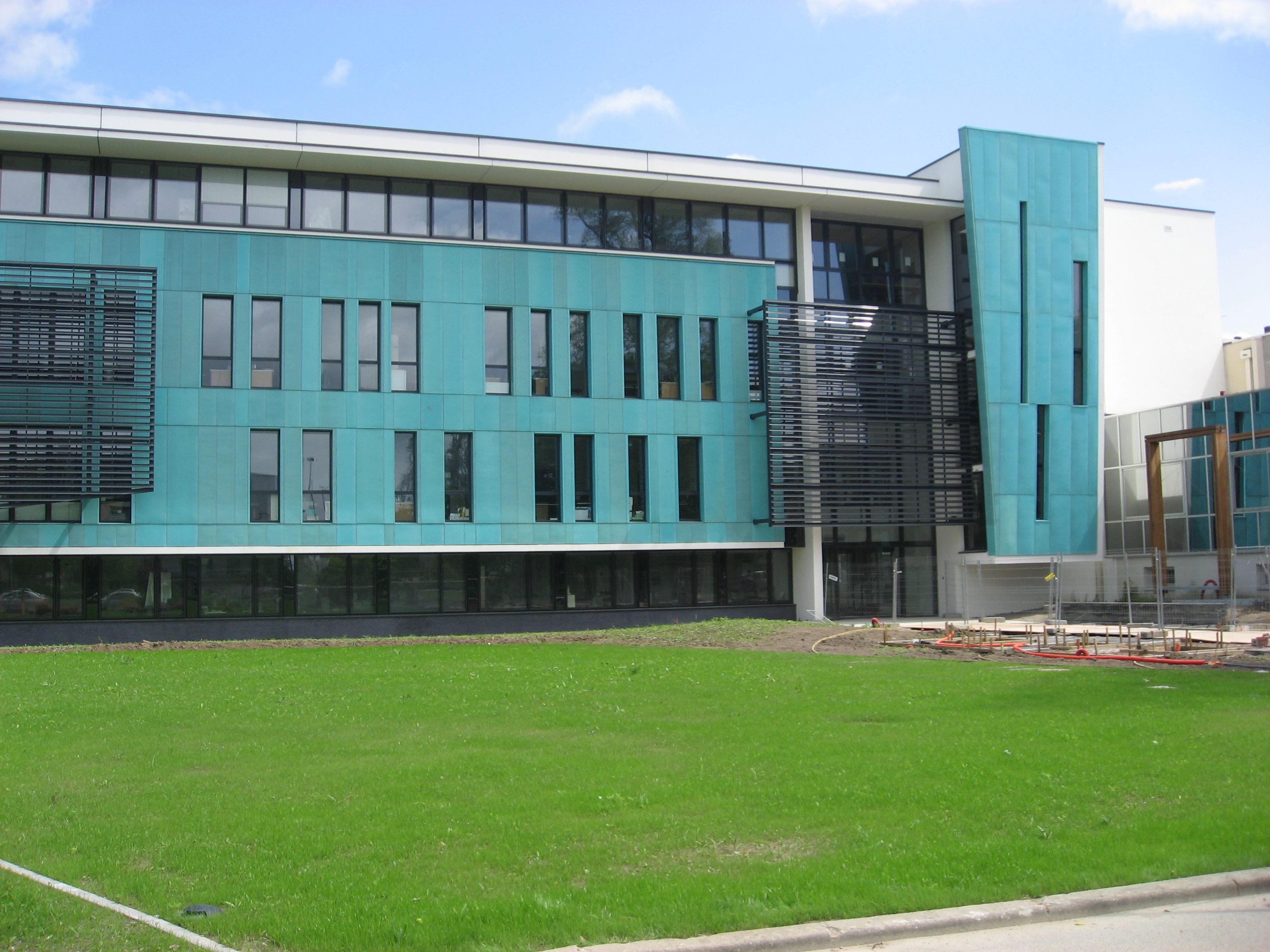 Nouveau bâtiment (2009) de l'Ecole Supérieure d'Agriculture d'Angers, Pays de Loire, France.